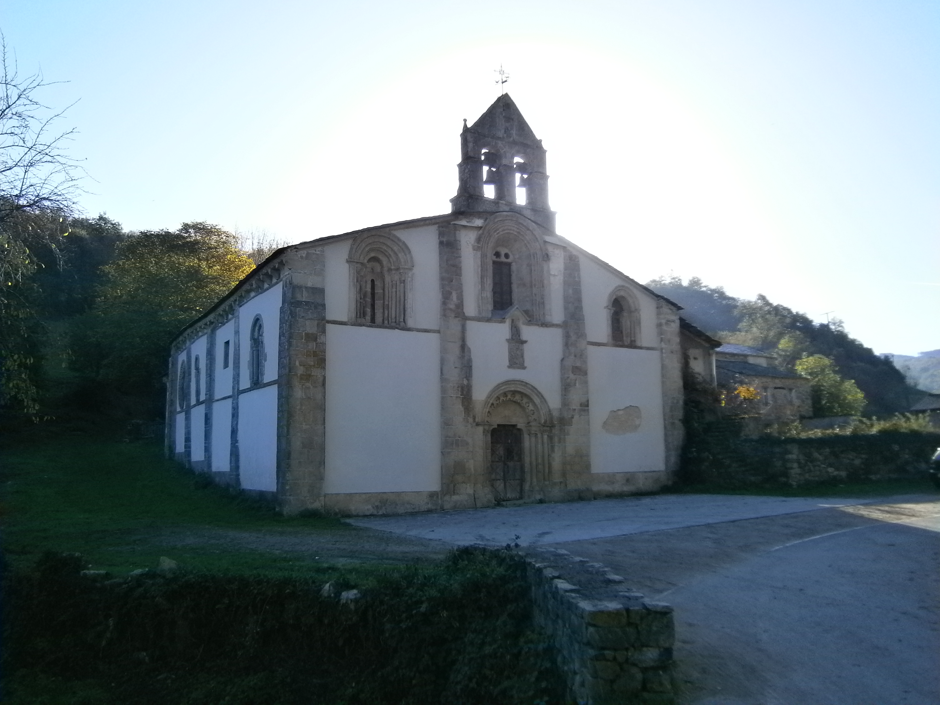 Convento de Santa María de Penamaior